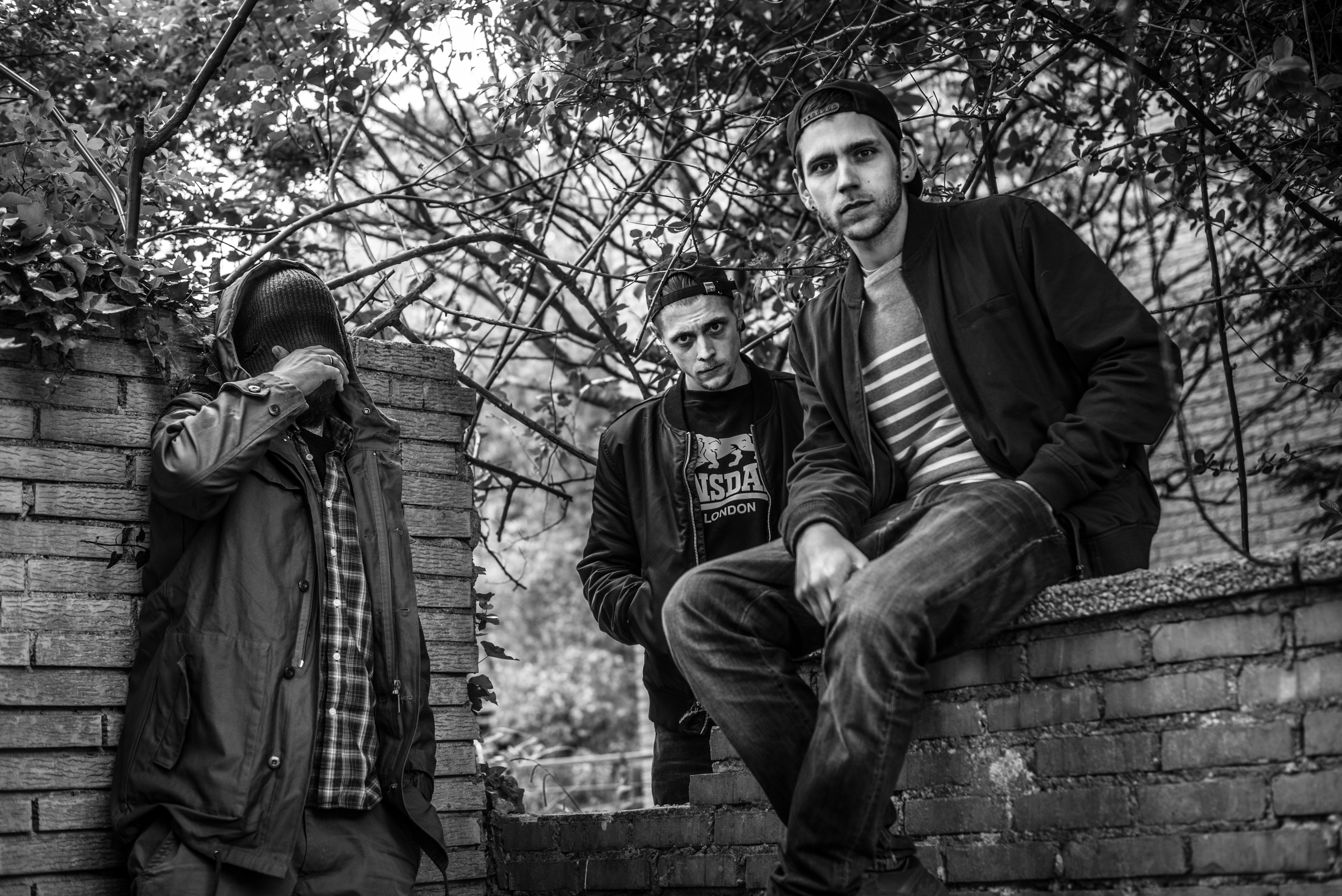 Pressefoto der Hip-Hop-Musiker Degenhardt und Kamikazes